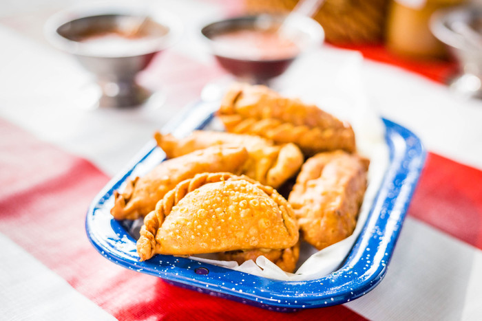 Empanadas argentinas fritas.